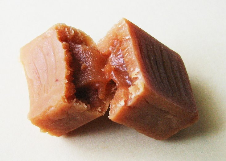 Krówka - struktura